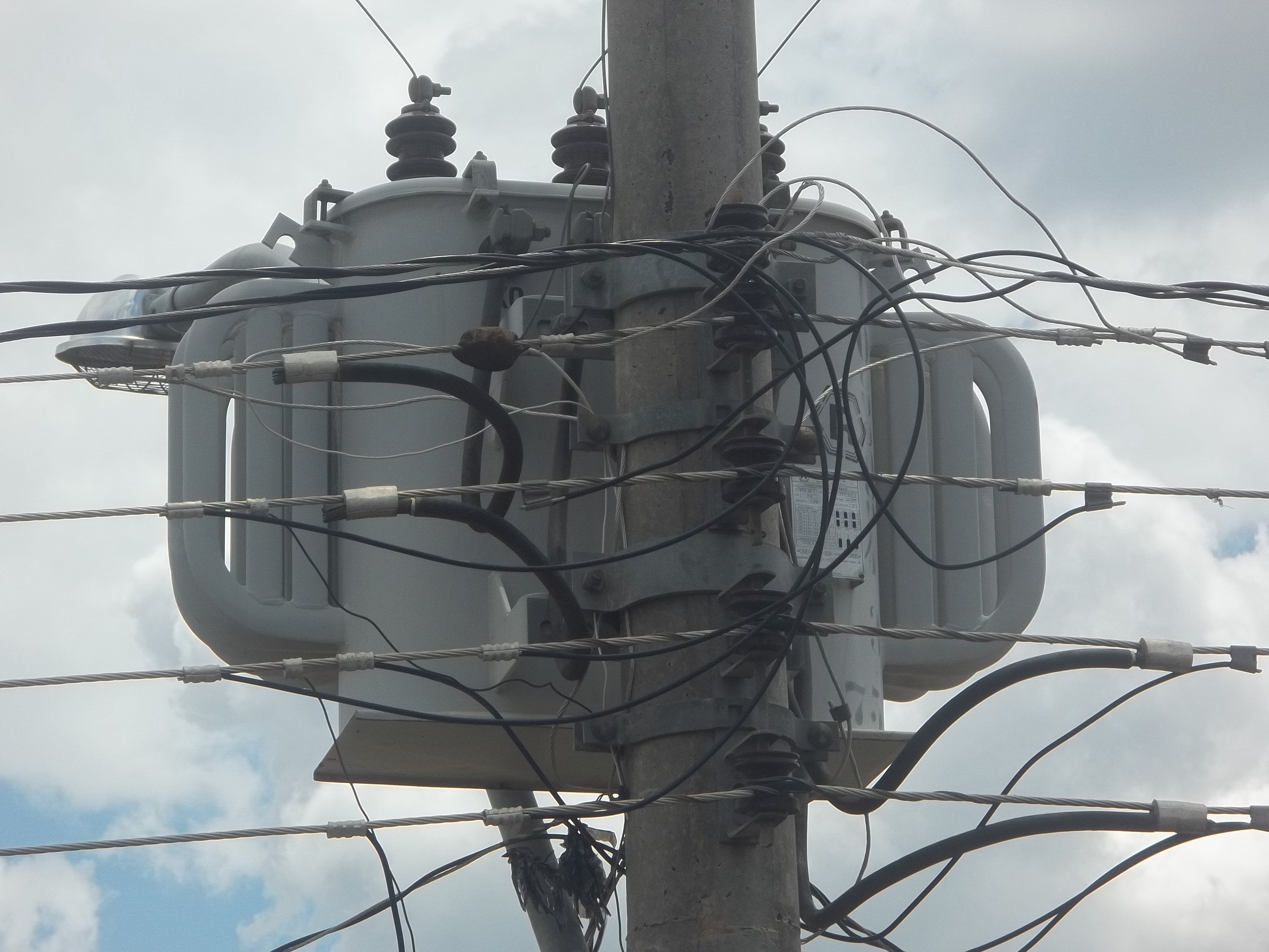 Transformador de energia de distribuição, localizado na Rua Dorcelino Rodrigues da Cunha, em Paulínia.